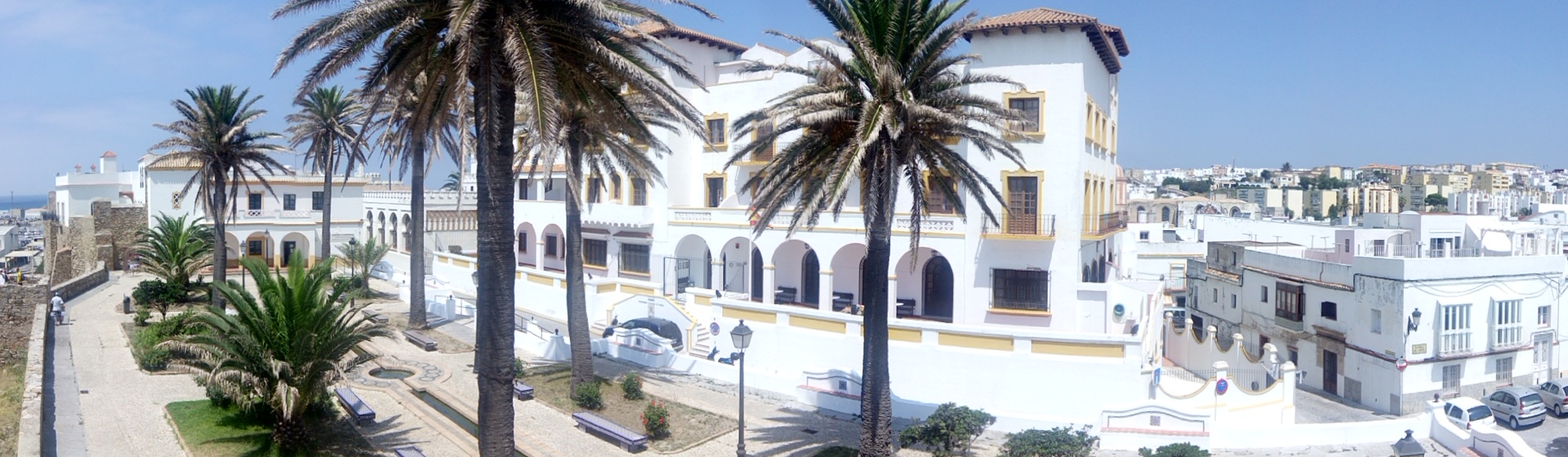 Panorámica de la calle Amarguras en Tarifa, (España). Julio de 2014.